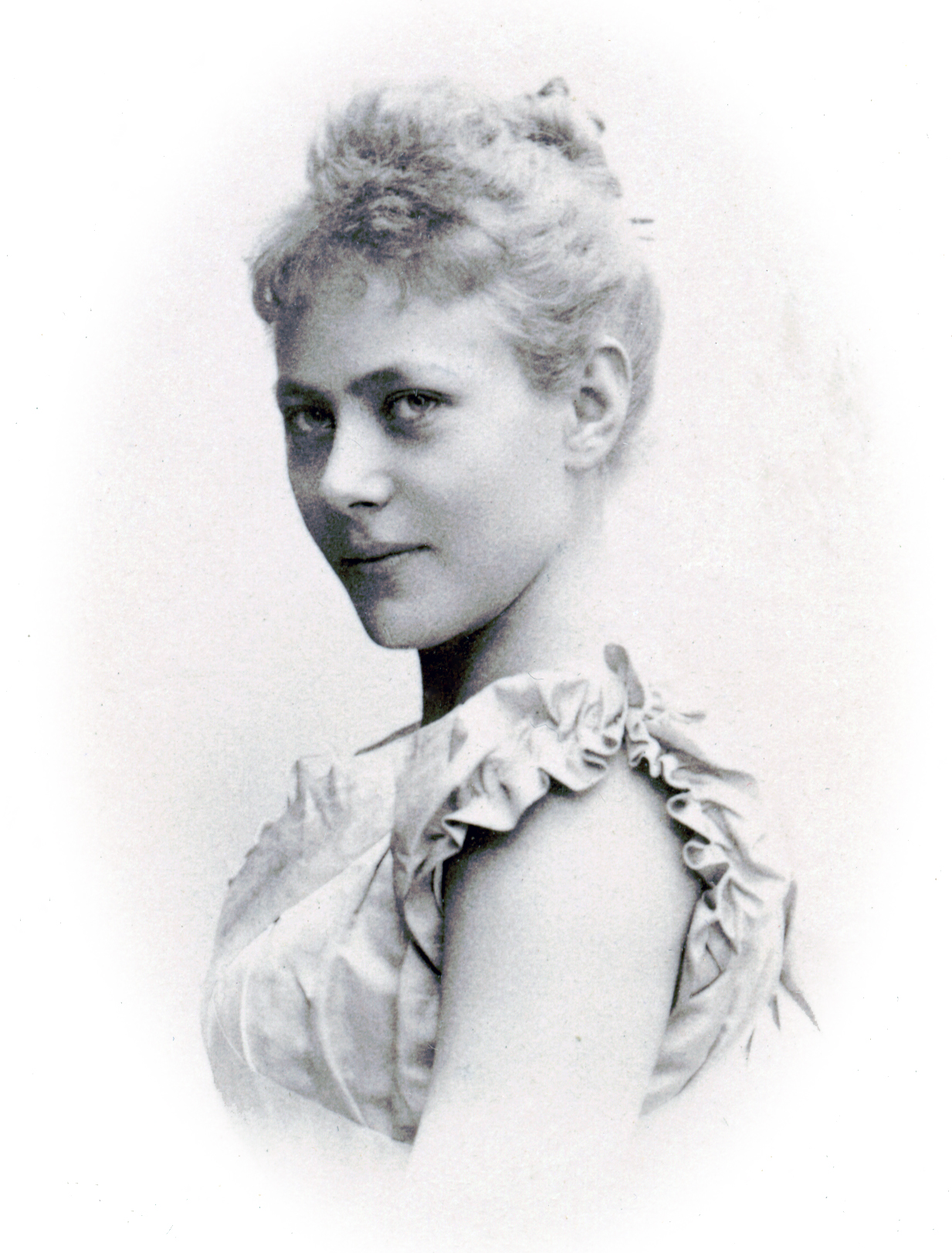 Sigrid Eliason, skådespelare vid Albert Ranfts sällskap 1892